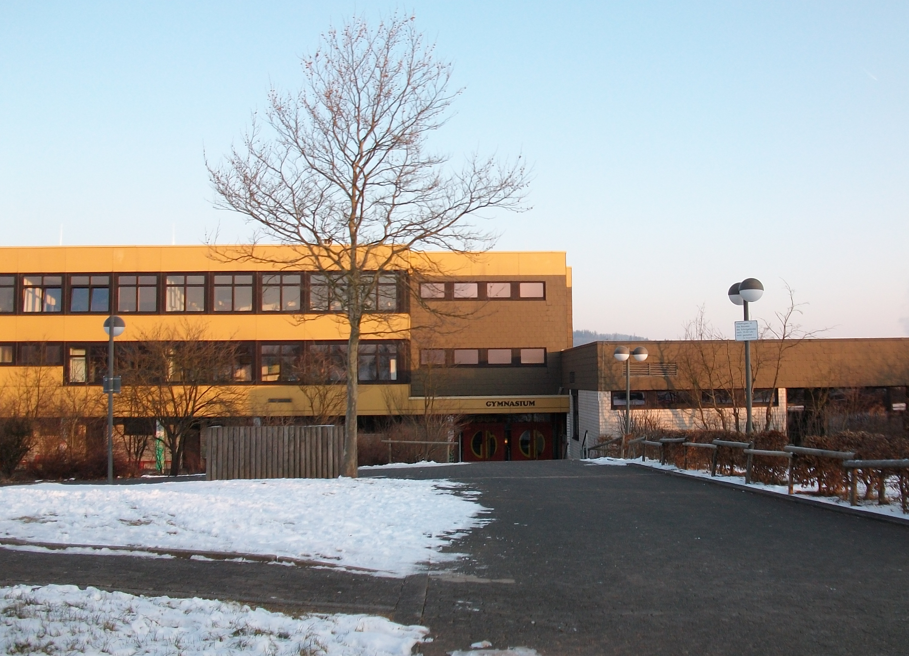 Gymnasium in Medebach (Schulzweckverband Gymnasium Winterberg und Medebach), Germany